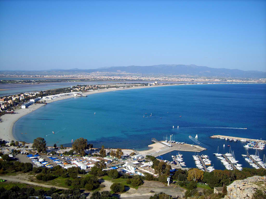 Vista sul lungomare Poetto, sulla sinistra si vedono anche le saline.. Cagliari - Italia. Beachfront Poetto, on the left are also the saltem.. Cagliari - Italy.